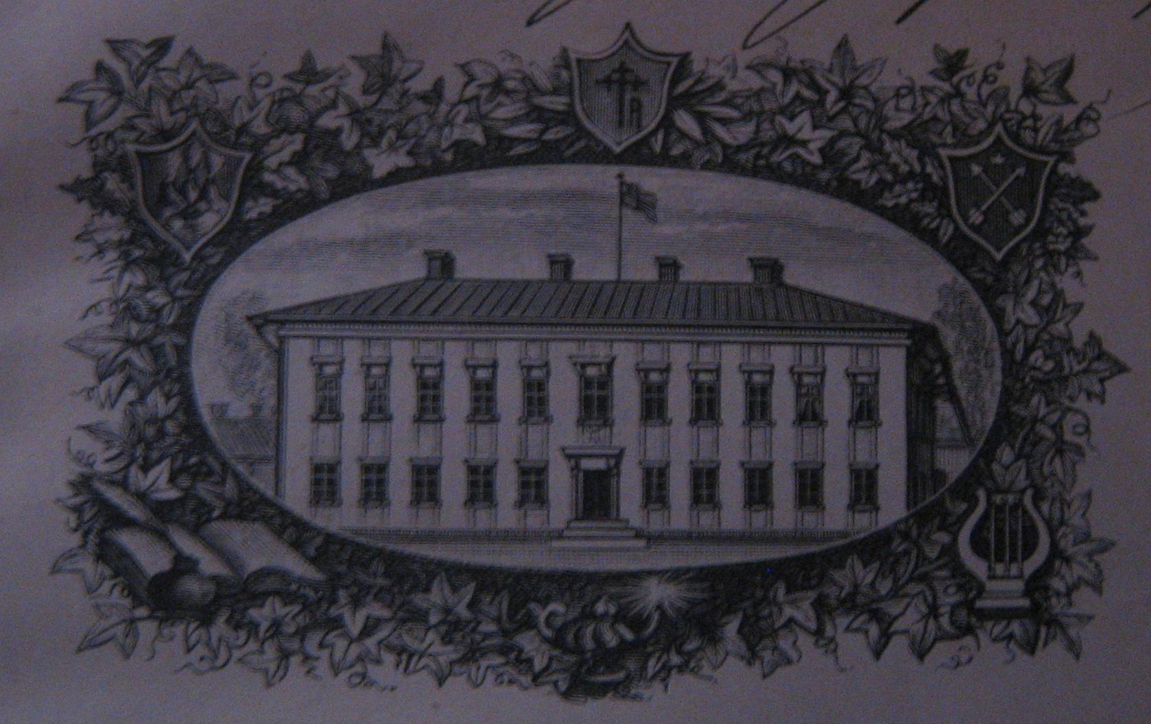 Xylografi på omsättsbladet till "Minne af Vestmanland-Dala nations i Upsala femtioårsfest 1881".